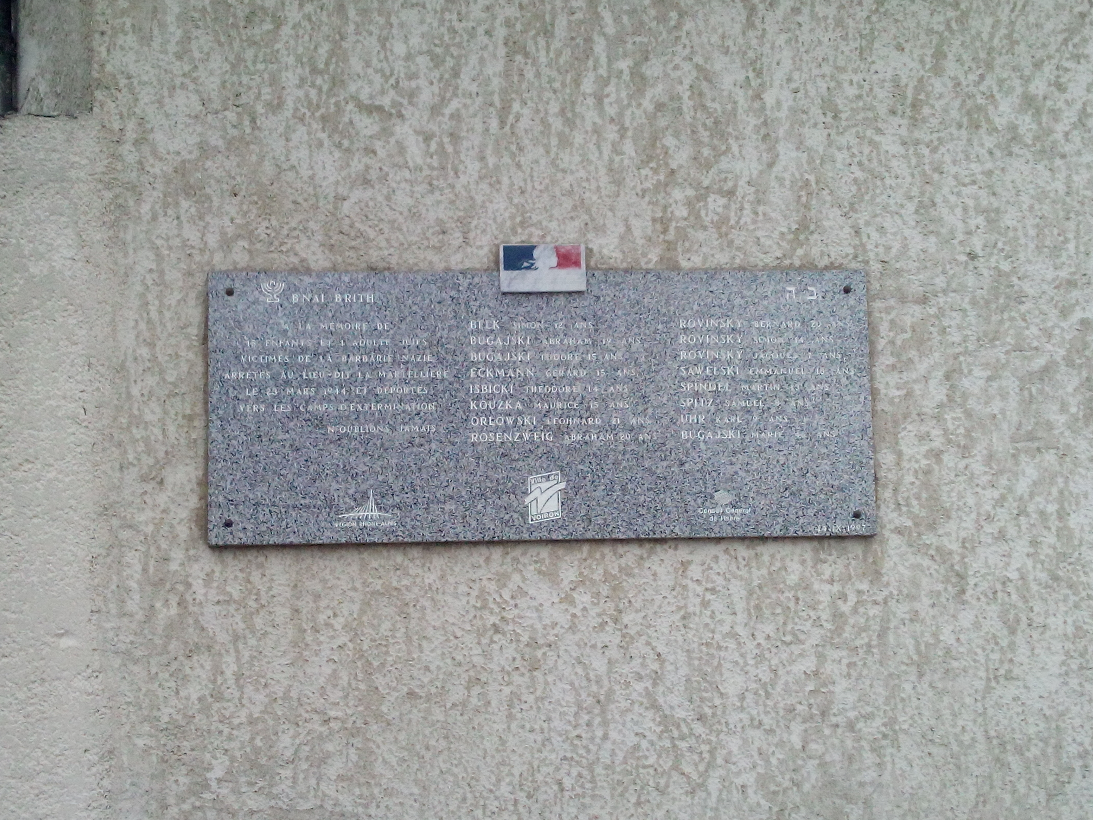 Plaque commémorative de la rafle de la Martellière - Mur du lycée agricole de la Martellière